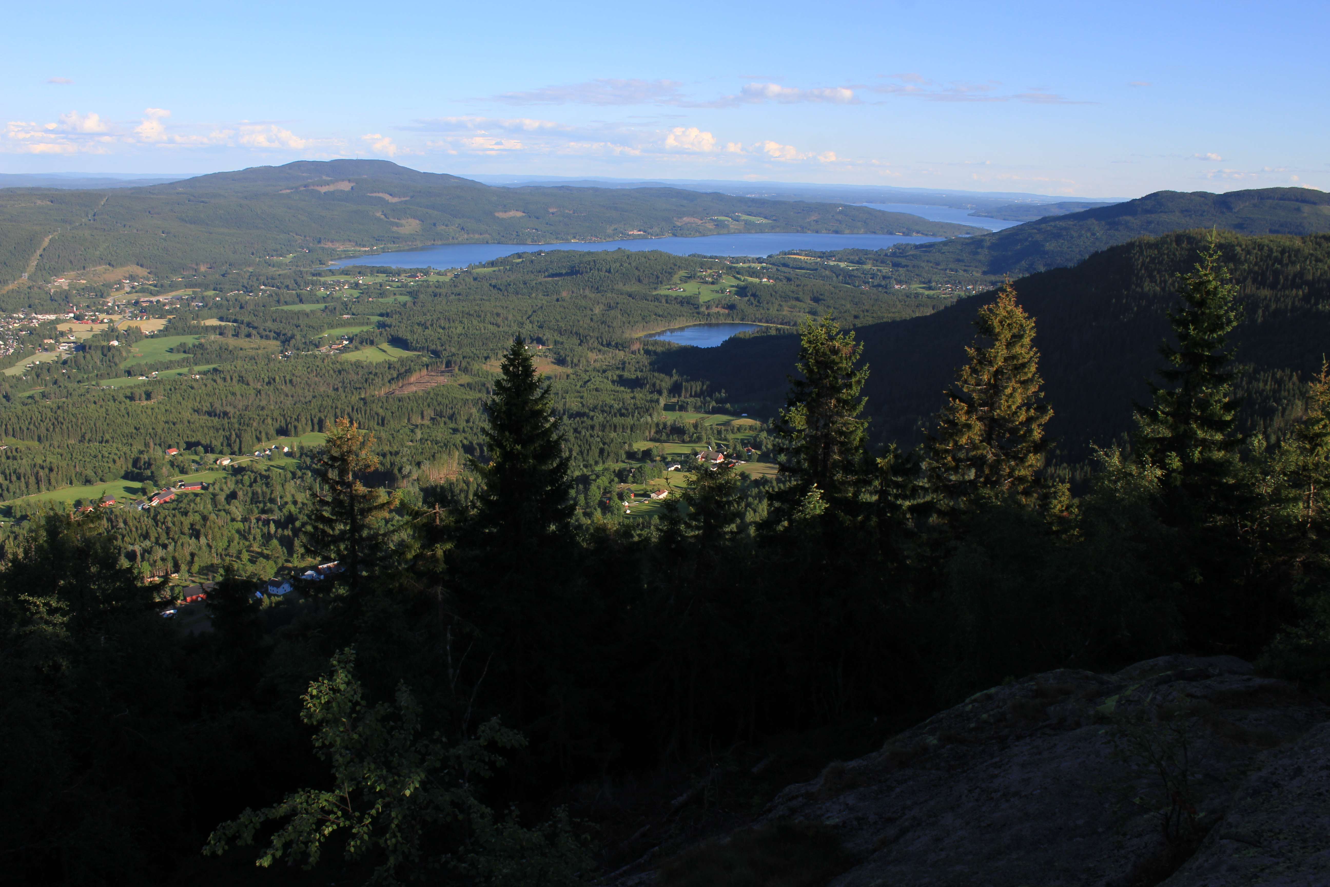 Hurdal og Hurdalssjøen sett fra Rognstadkollen